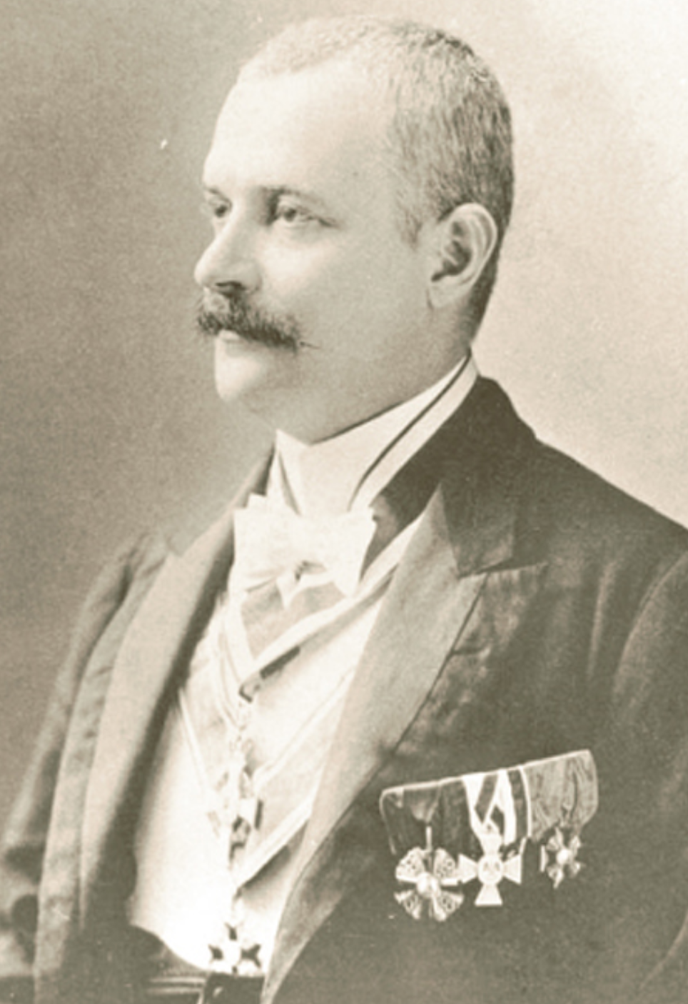 Porträtfotografie des Paläontologen Fritz Noetling